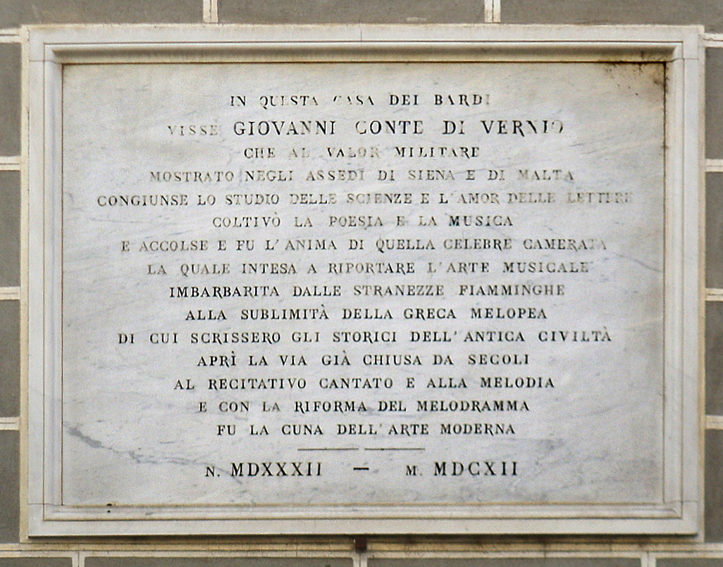 Palazzo busini-bardi, targa camerata dei bardi